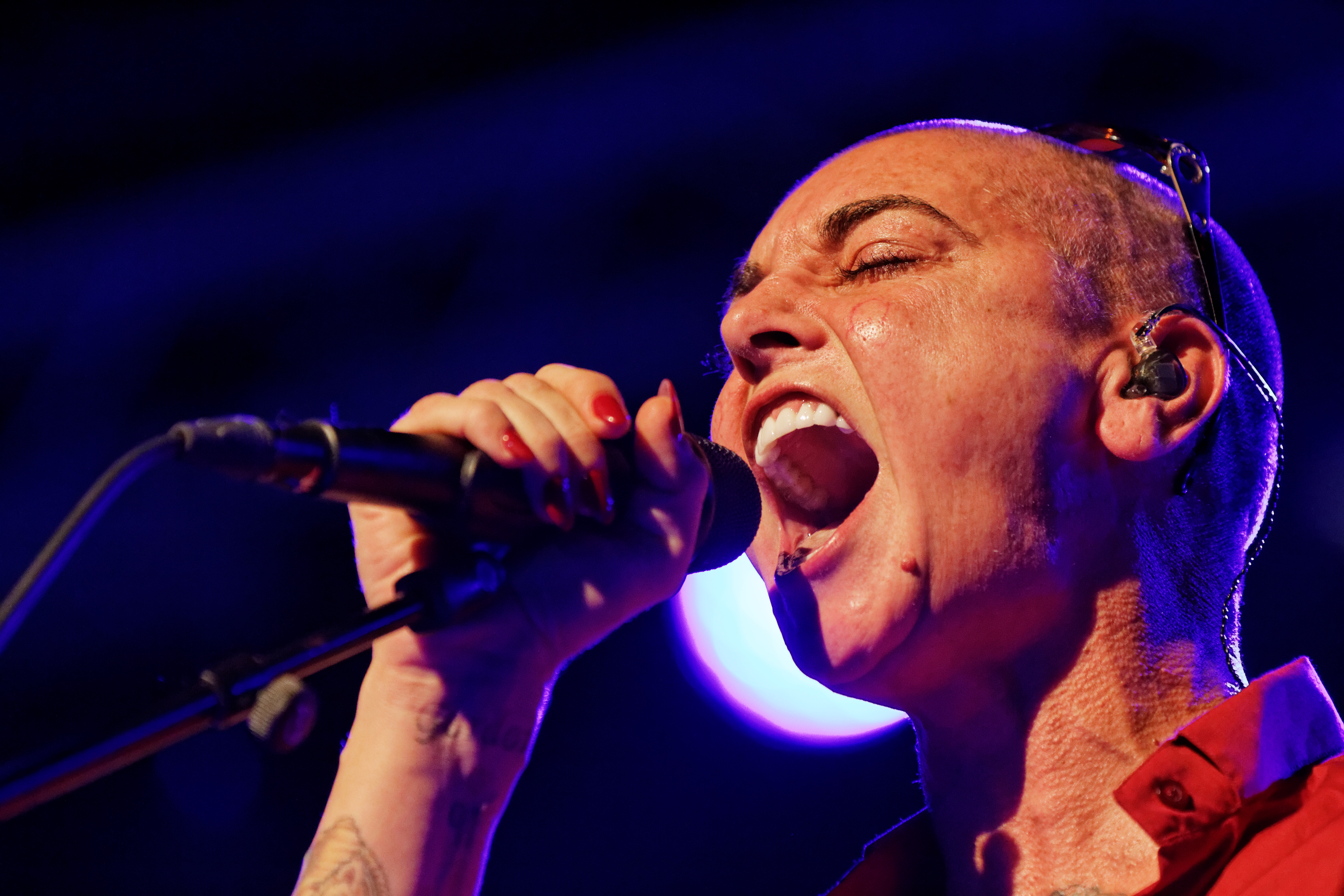 Sinéad O’Connor en concert sur la scène Gradlon lors du festival de Cornouaille 2014.